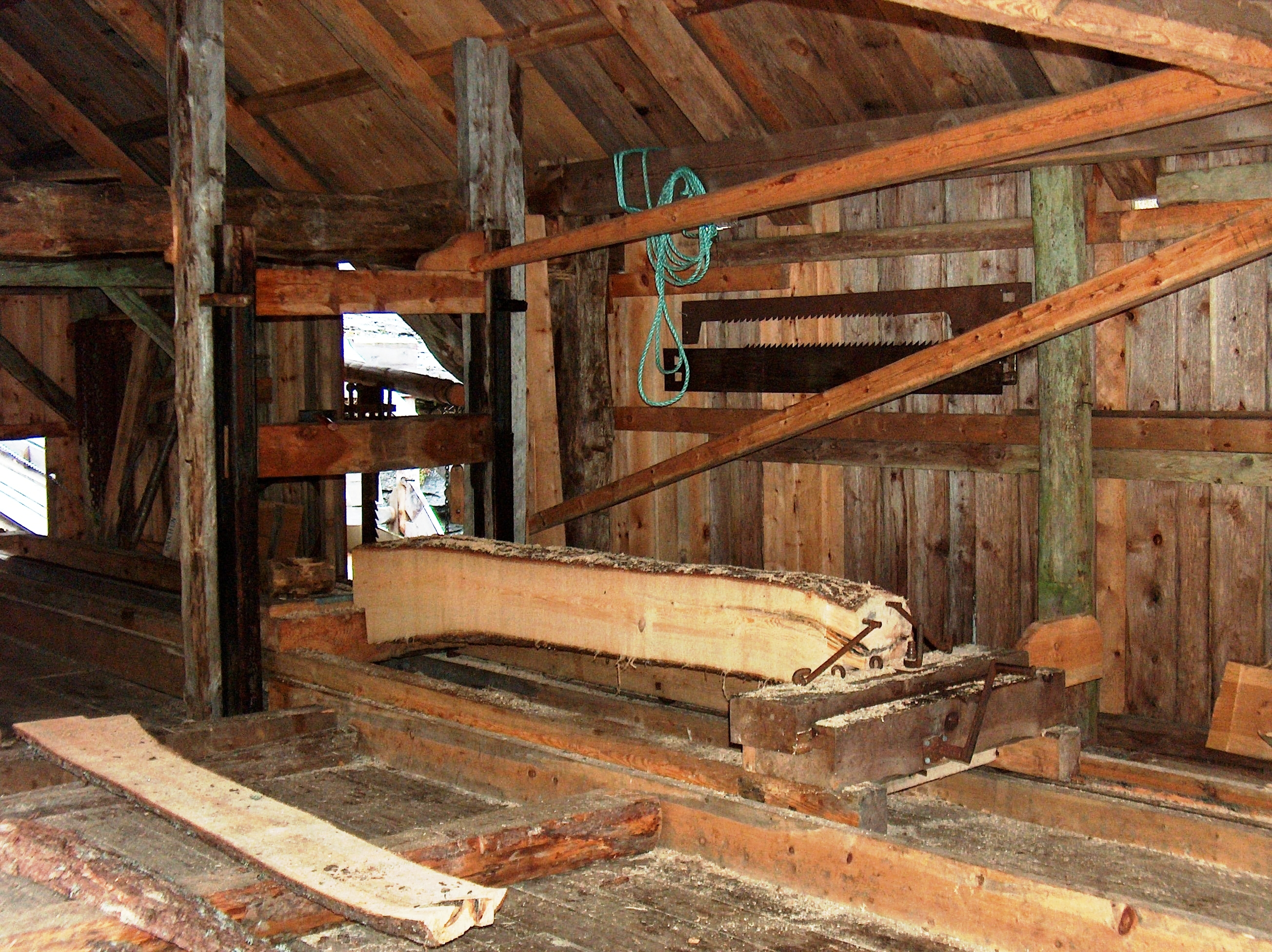 Oppgangssagbruk from Kvam in Norway